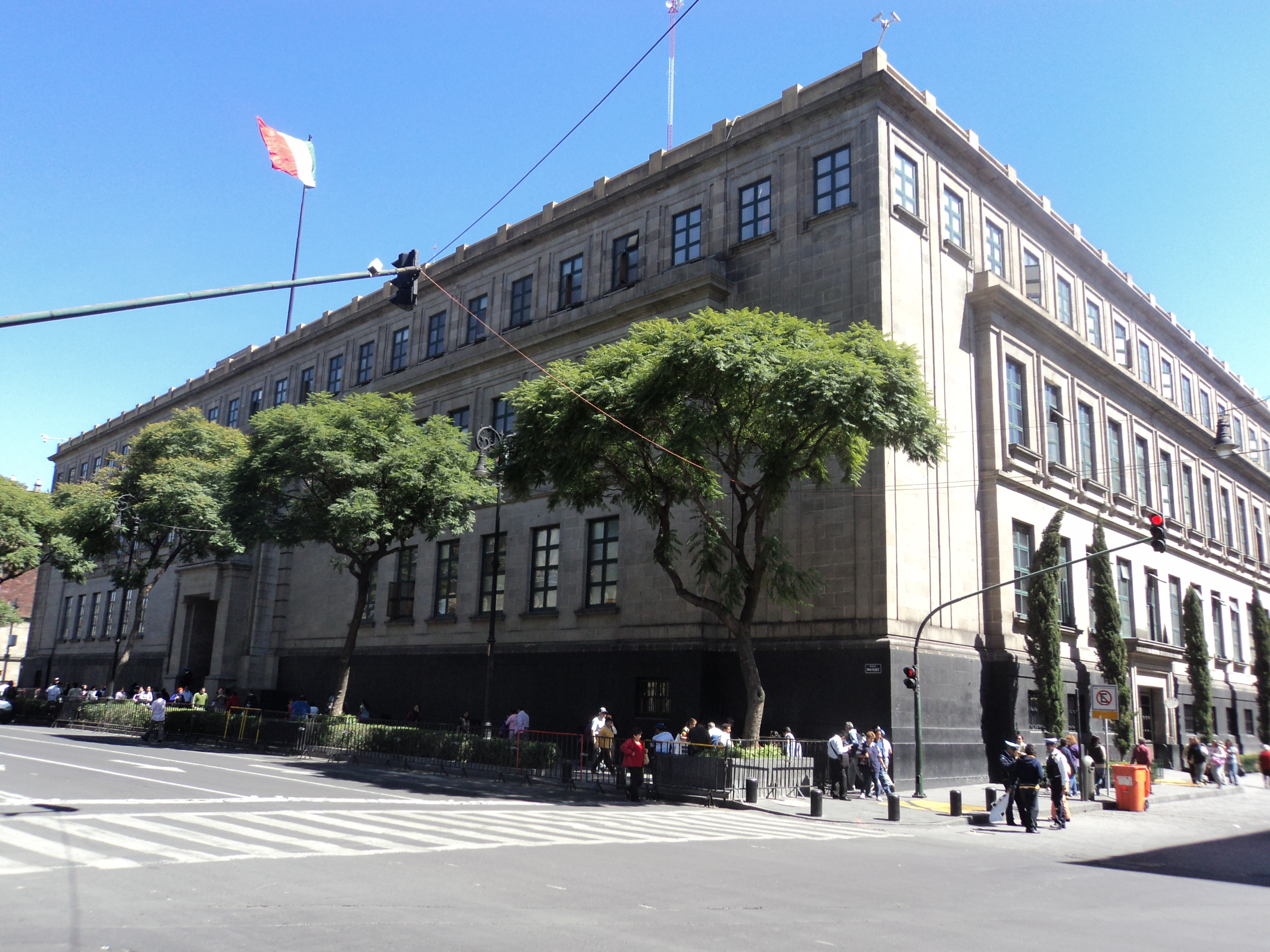 suprema corte de justicia de la nacion